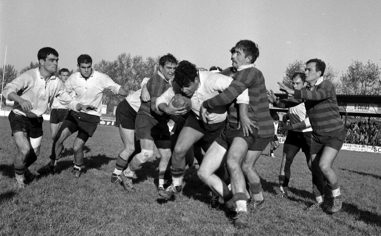 Stade Ernest Wallon. Le 25 Novembre 1962. Vue d'une phase de jeu entre le Stade Toulousain et le club de Tyrosse.